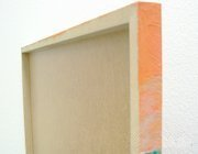 Decoblock in Rückansicht